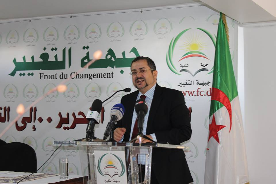 صورة للأستاذ عبد المجيد مناصرة رئيس جبهة التغيير